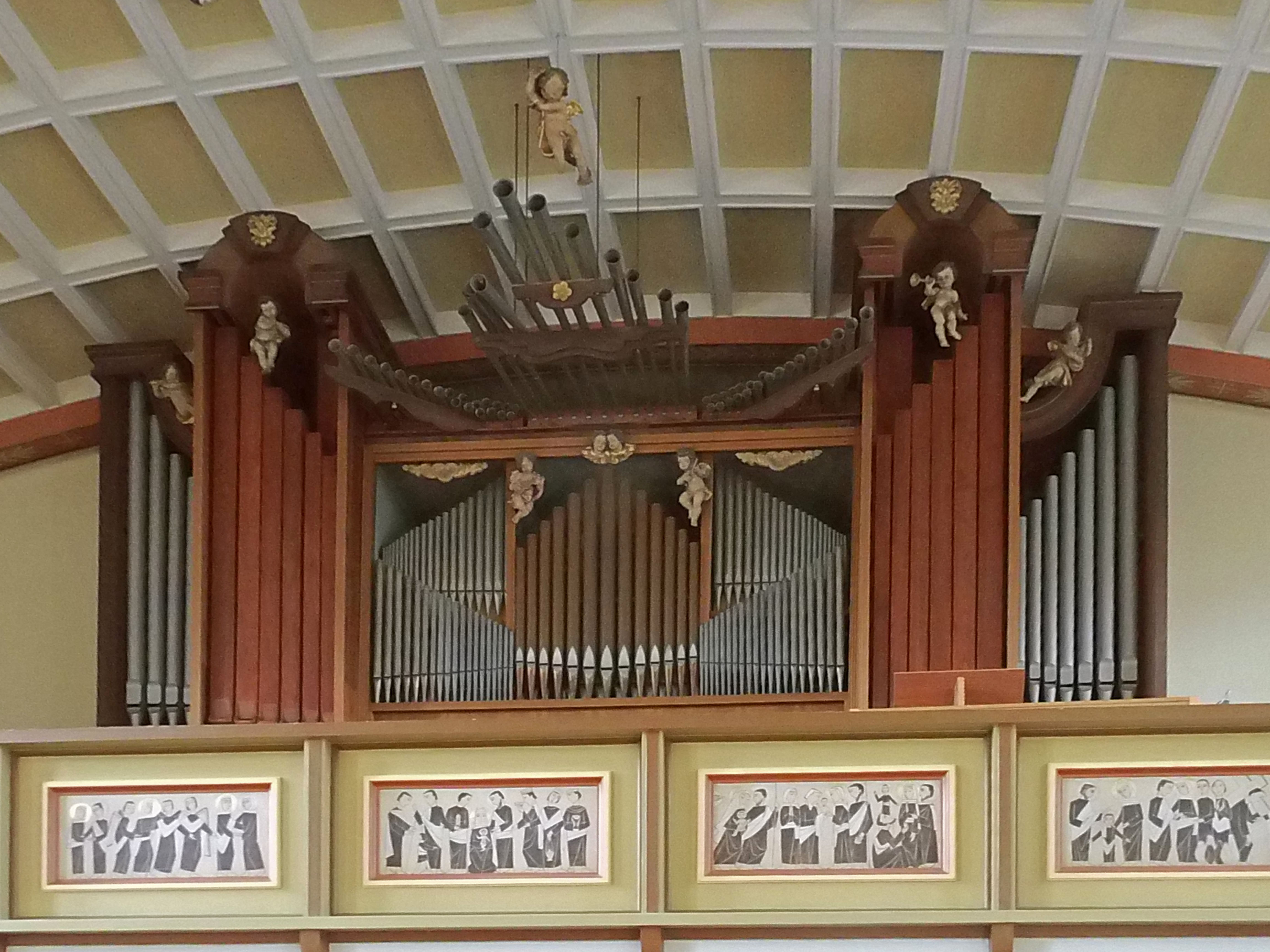 Orgel der römisch-katholischen St.-Gabriel-Kirche in Salzgitter-Gebhardshagen.